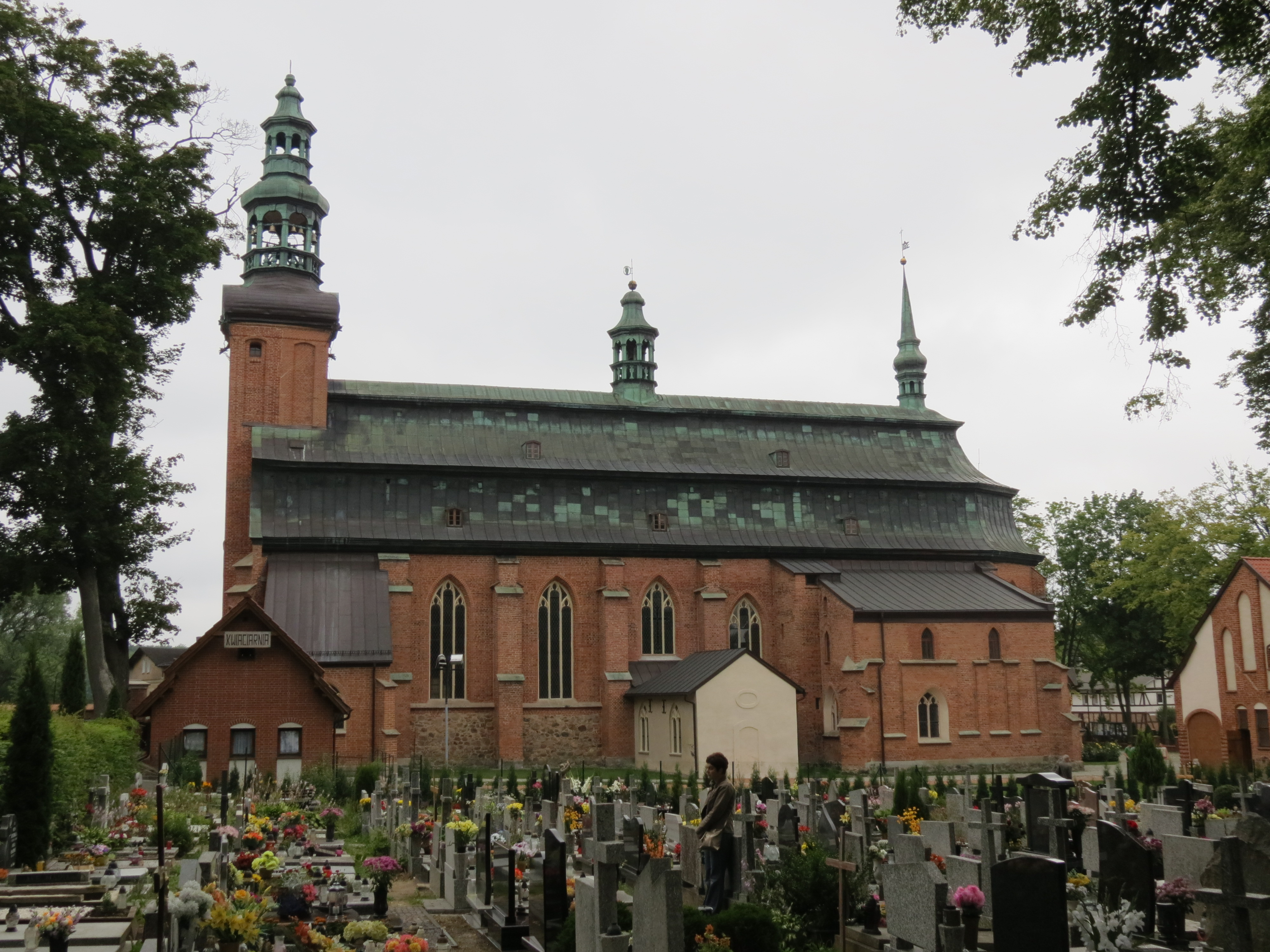 Kartuzy, kościół p.w. Wniebowzięcia NMP, 1383-1405, 1730-1733